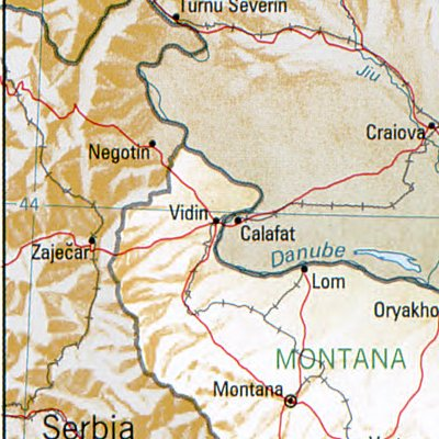 Widin - Lage des Ortes in Bulgarien